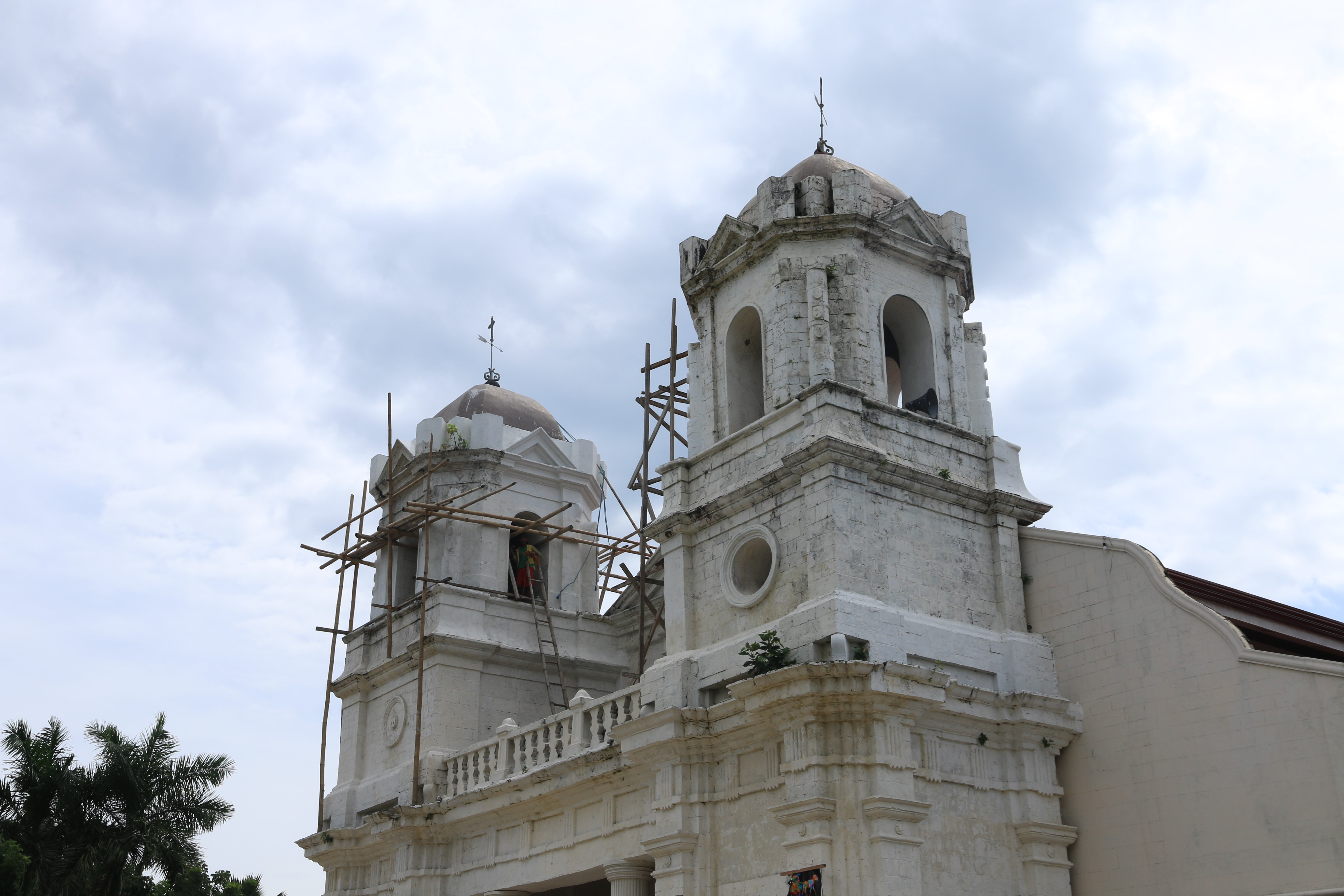 Saint Teresa of Ávila Church in Talisay, Cebu